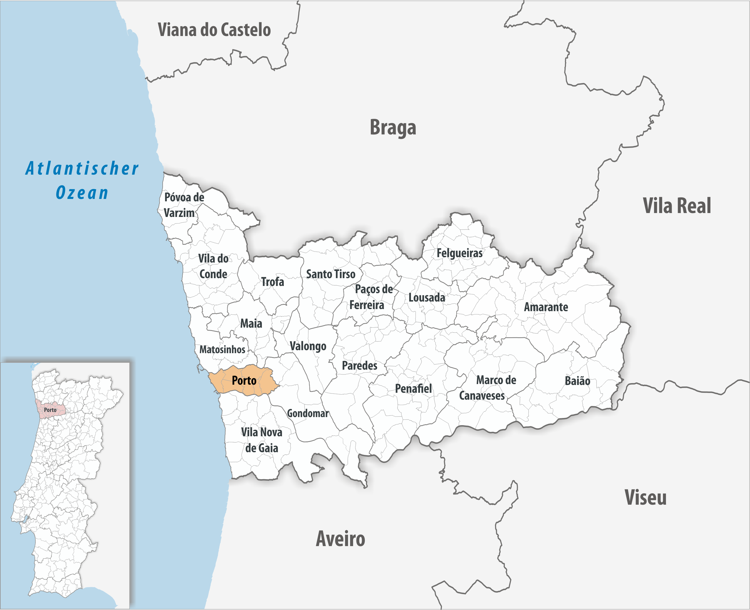 Kreis Porto